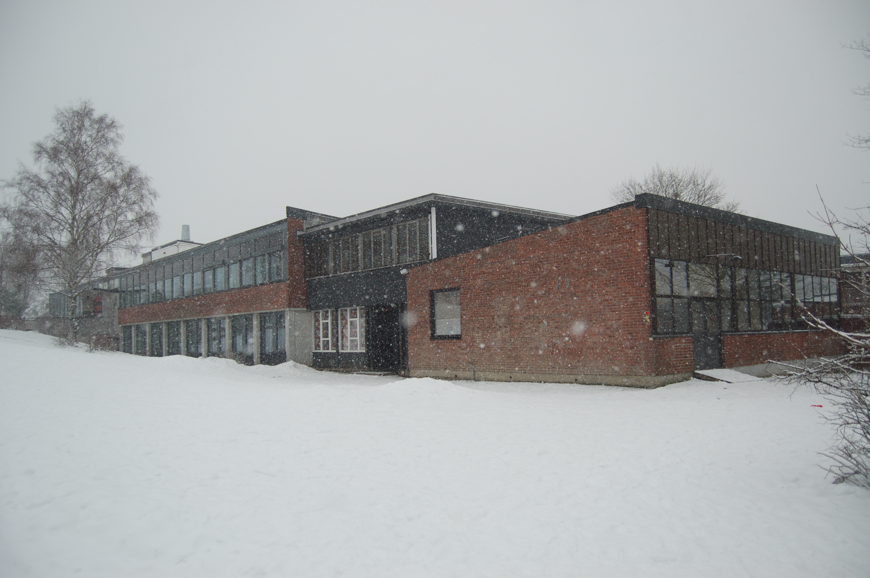 Trosvik skole mars 2009. Foto: Kristine Gangfløt.